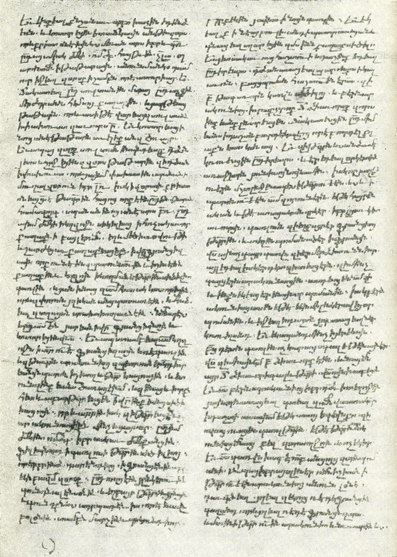 Страница из «Летописи» Нерсеса Палиенца (рук. Матенадаран № 2037)